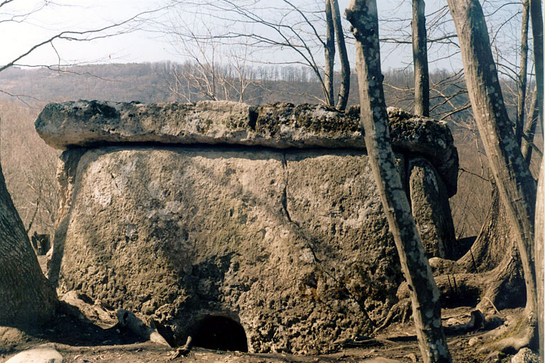 Дольмен около поселка Каменномоcтский, Майкопский район Адыгеи